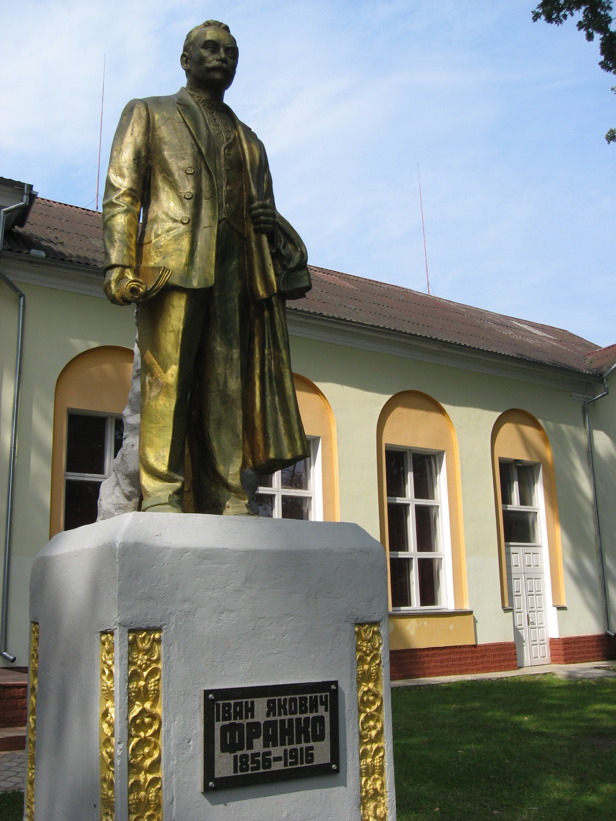 Пам'ятник І. Я. Франку, смт. Клевань, вул. Тиха, будинок культури